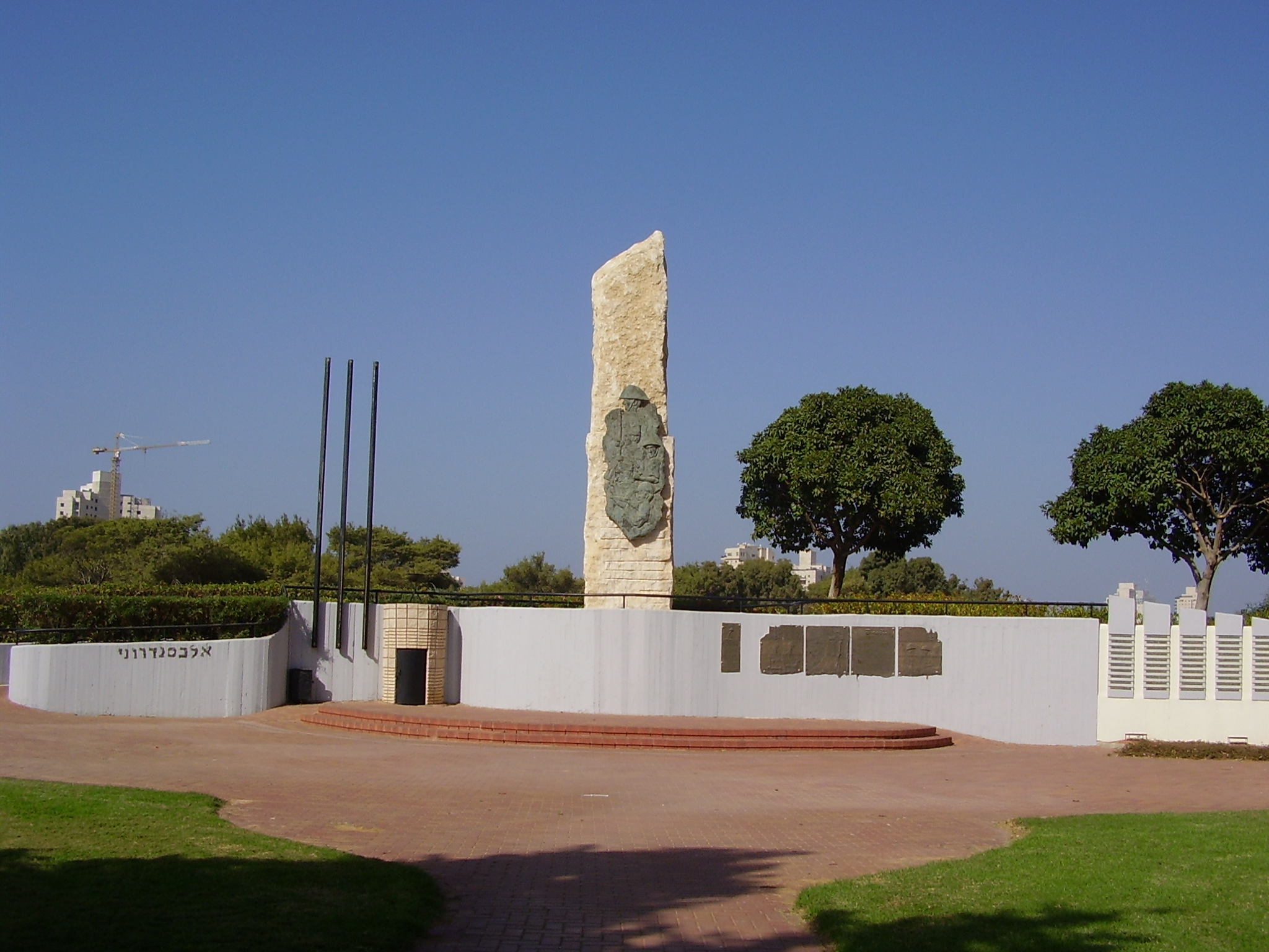 alexandroni brigade memorial, netanya, israel